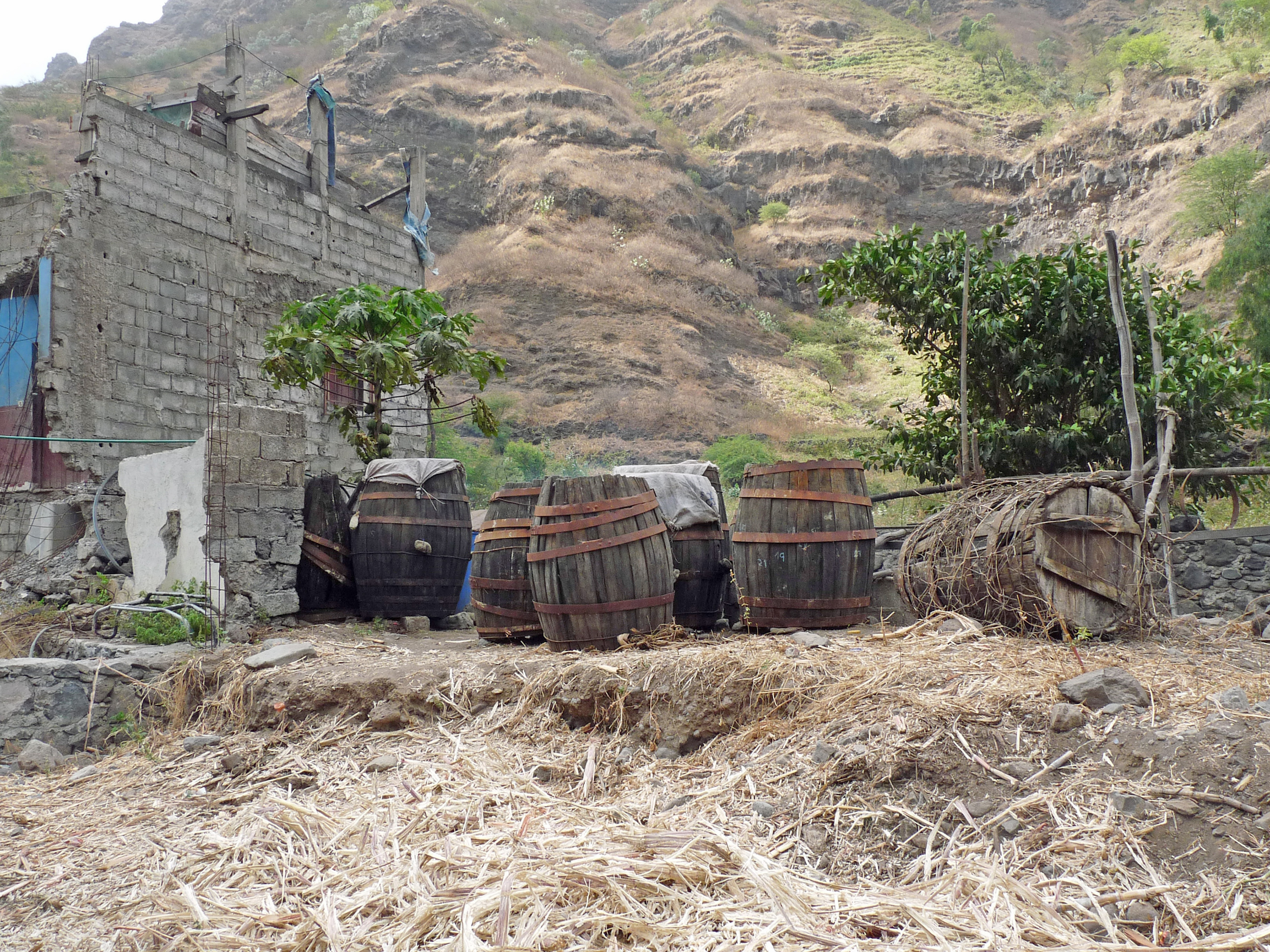 Ribeira Principal (île de Santiago, Cap-Vert) : distillerie artisanale (canne à sucre)